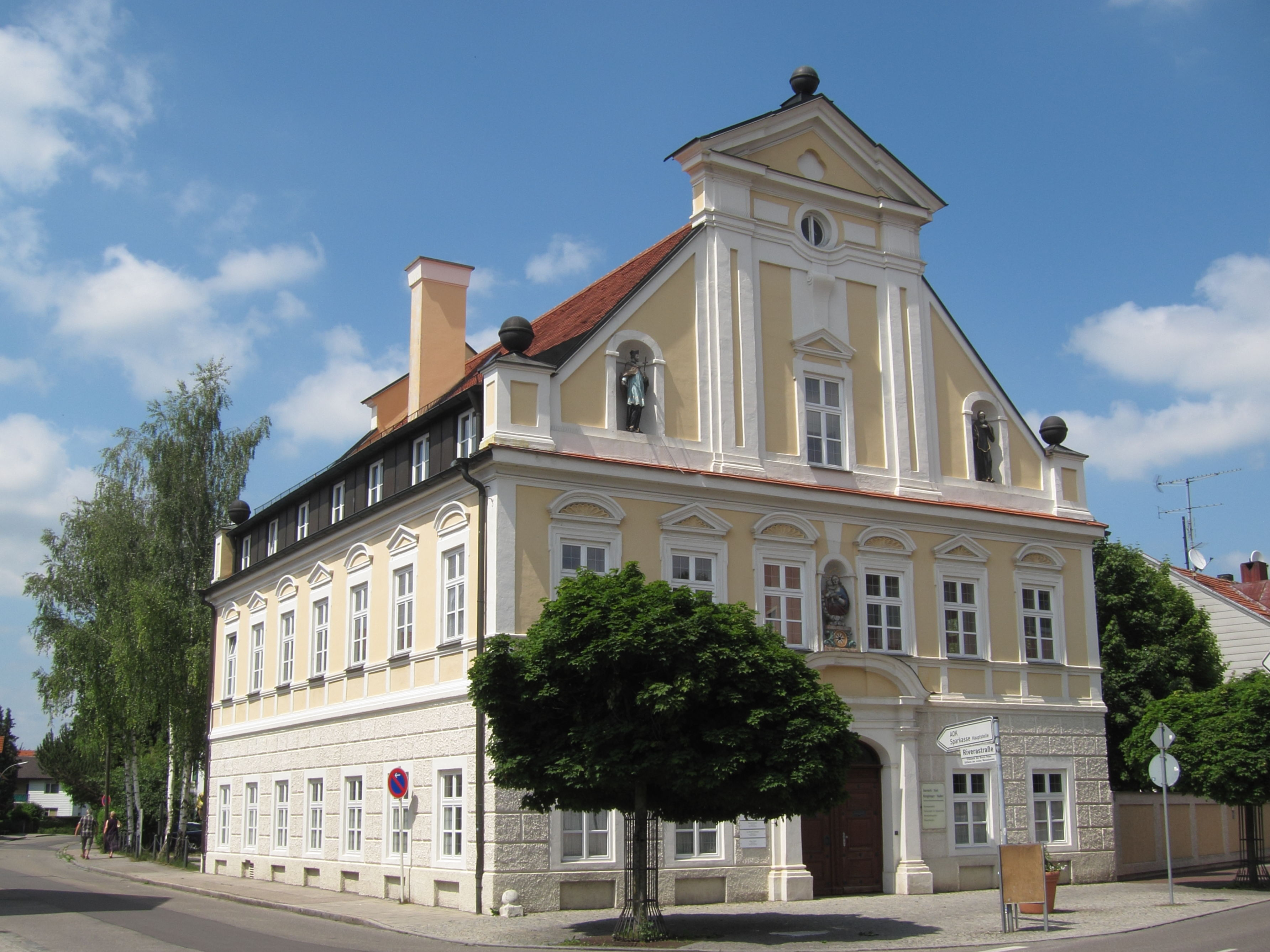 Münchner Straße 20; sog. Palais Rivera, zweigeschossiges Wohnhaus mit hohem Giebel und Nischenfiguren, 1712, durch Brand 1938 teilzerstört.